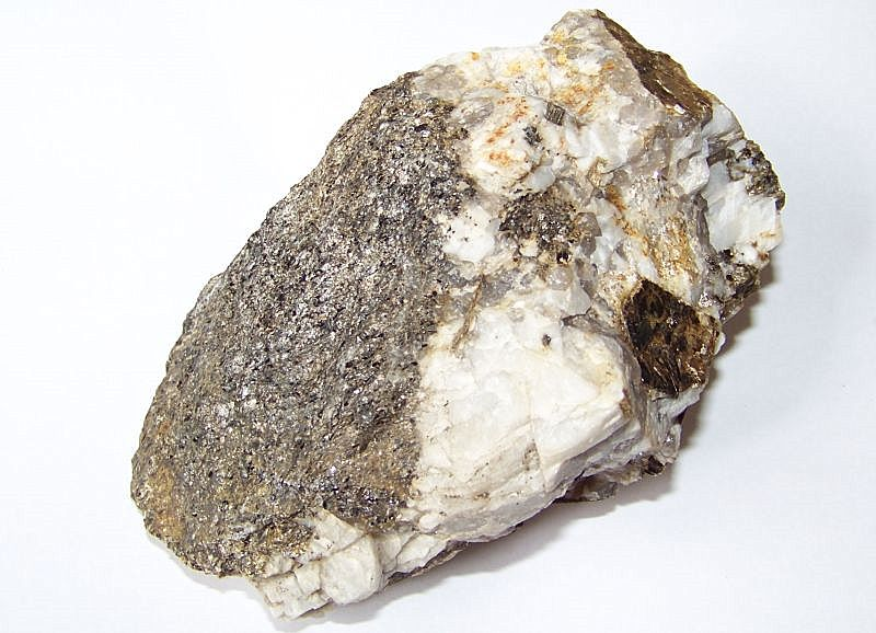 Pegmatyt na kontakcie z migmatytem. Michałkowa, Góry Sowie, Dolny Śląsk, Polska.